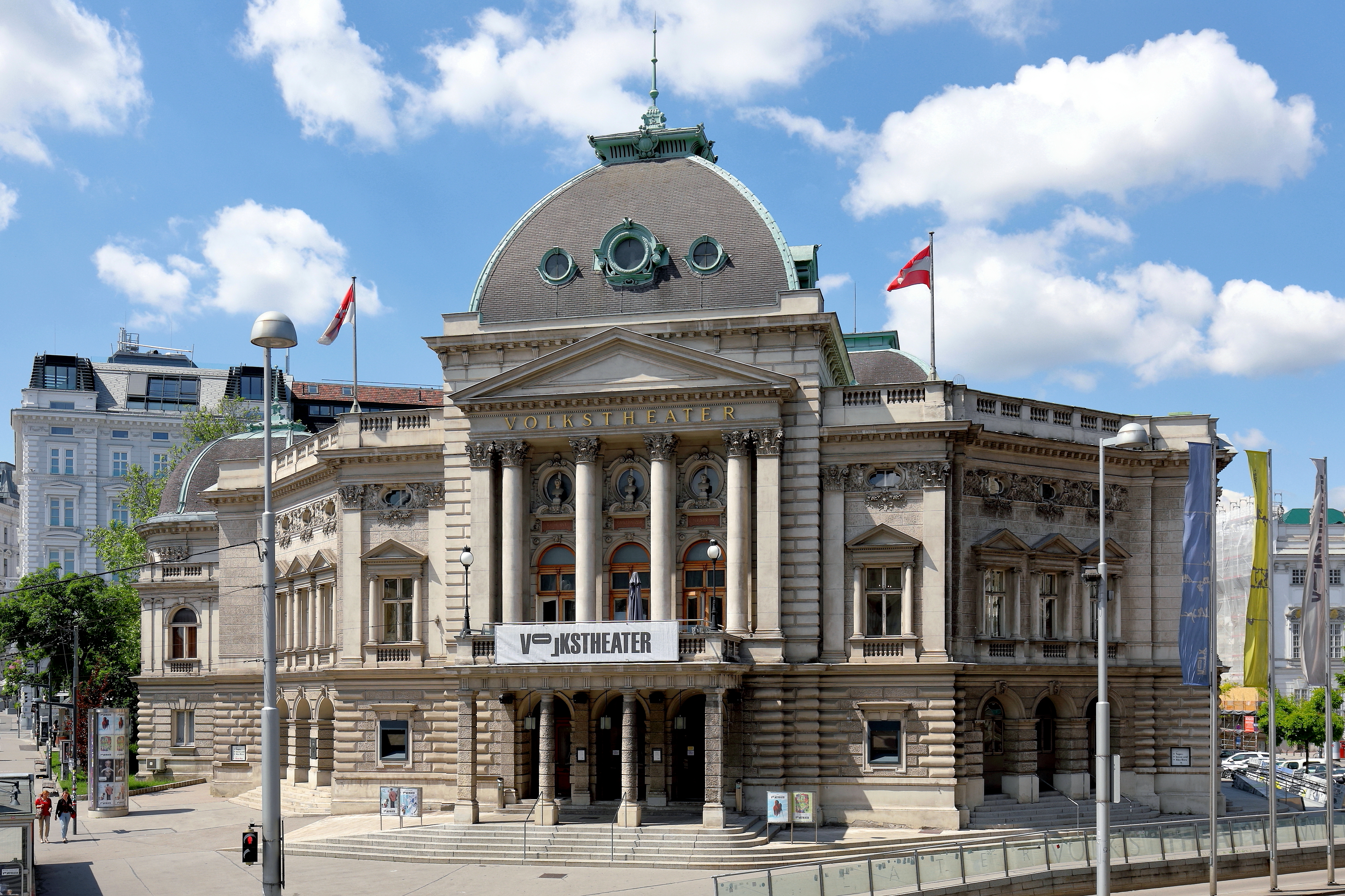 Ostansicht des Volkstheater am Arthur-Schnitzler-Platz im 7. Wiener Gemeindebezirk Neubau.Das Theater wurde ab 1887 nach Plänen von Hermann Helmer und Ferdinand Fellner in Neorenaissanceformen errichtet und am 14. September 1889 mit Ludwig Anzengrubers Schauspiel „Der Fleck auf der Ehr’“ als Deutsches Volkstheater eröffnet. Über dem Hauptportal befinden sich die Büsten von Ferdinand Raimund, Johann Nestroy und Franz Grillparzer. Diese wurde im Zuge der Generalsanierung 1989 angebracht. Ursprünglich gab es welche von Friedrich Schiller, Gotthold Ephraim Lessing und Grillparzer.